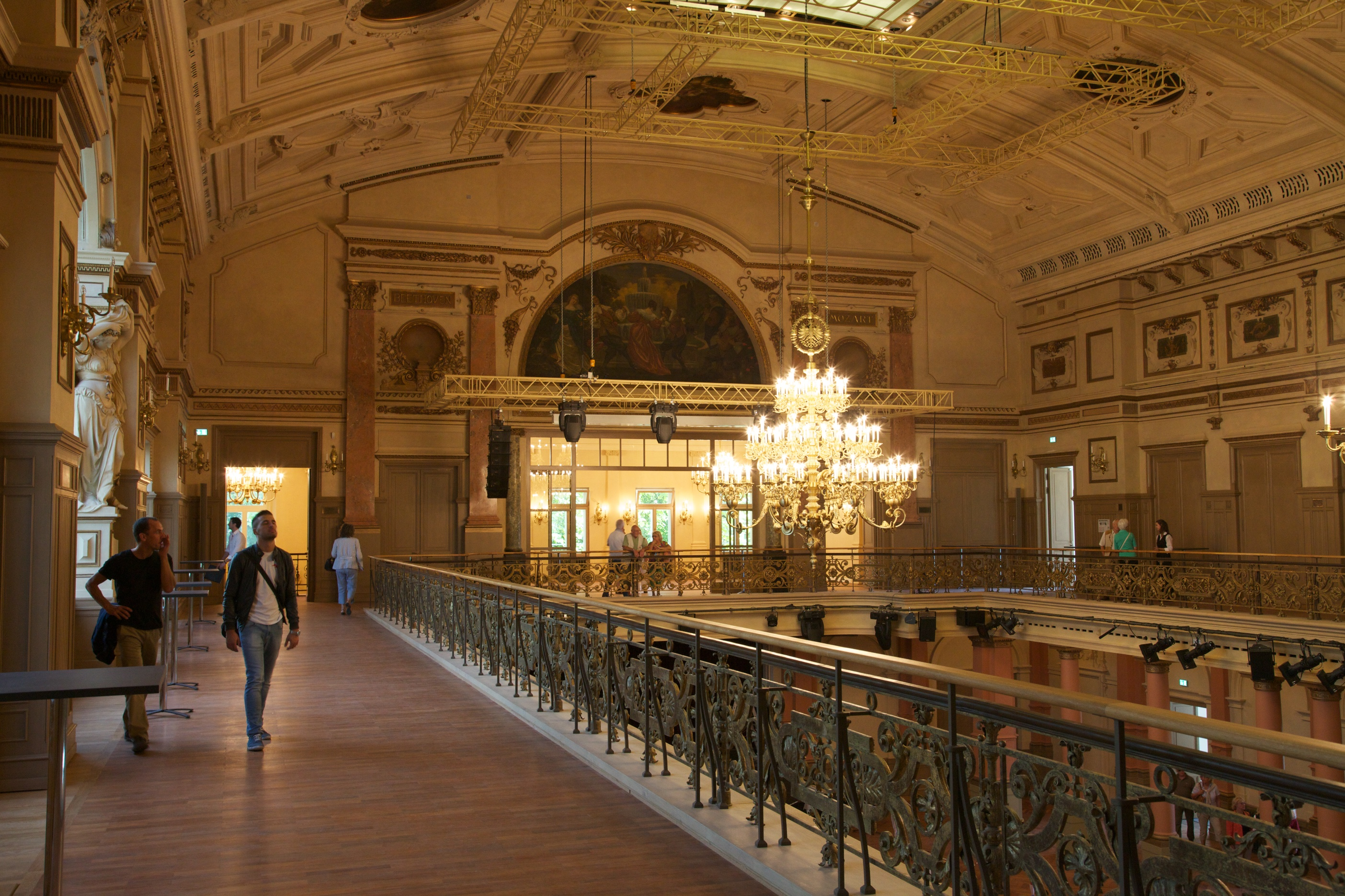 Gesellschaftshaus des Palmengartens Frankfurt am Main im September 2012